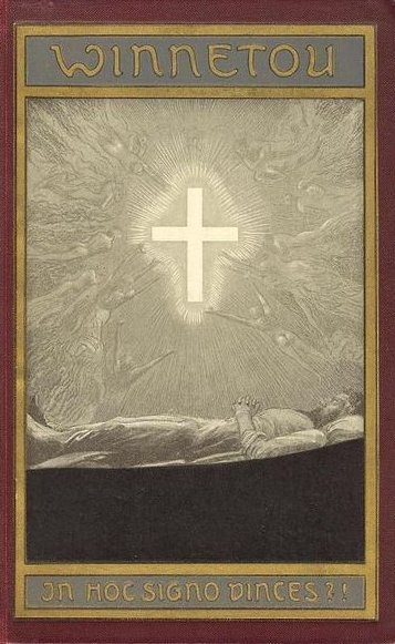 Deckelbild der Erstausgabe des Romans Winnetou IV von Karl May